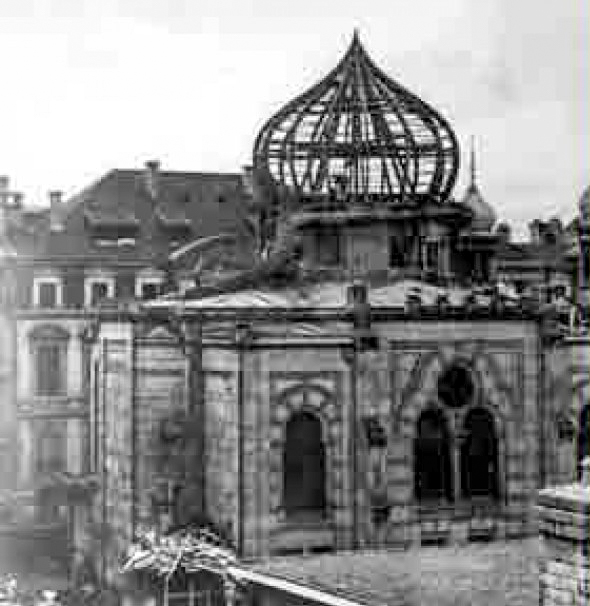 D'Stater Synagog gëtt am Krich vun den Nazien zerstéiert.